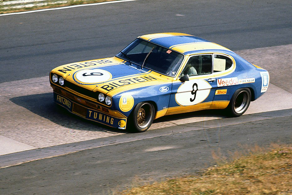 Ford Capri von Fritzinger/Heyer beim Training zum Großen Preis der Tourenwagen 1973 auf dem Nürburgring im Karussell